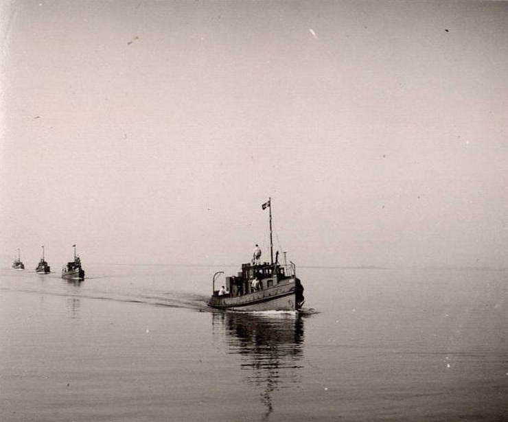 Flußräumboote im Zuider See